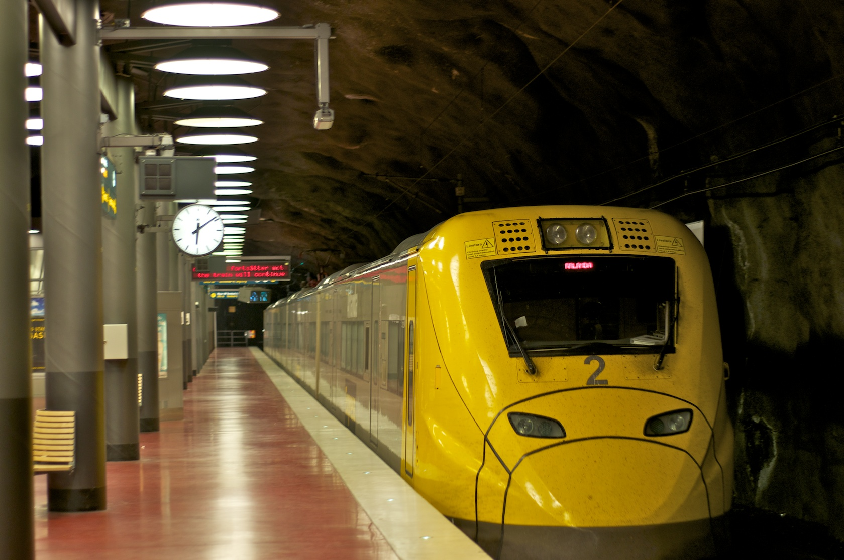 På plattformen under Arlanda.